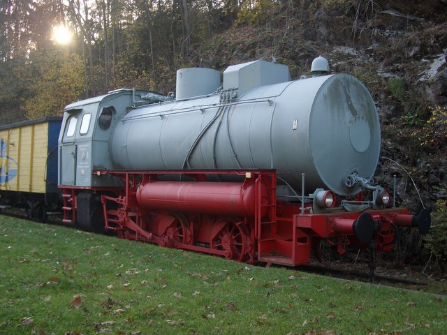 Dampfspeicherlok Nummer 3 der Papierfabrik Rosenthal (LKM 219189) am Bahnhof Lichtenberg als Denkmal.